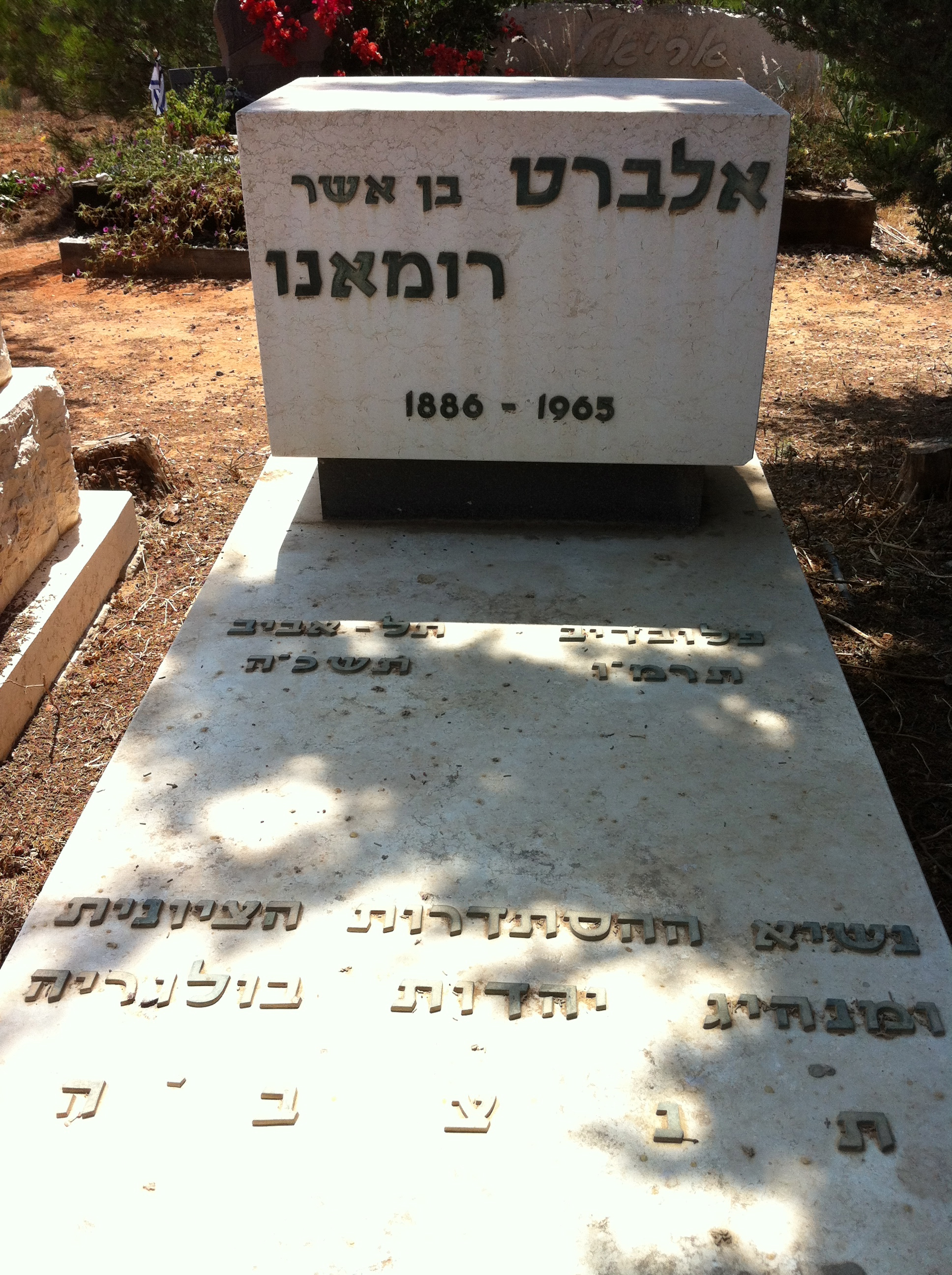 חלקת קברו של אלברט רומנו נשיא ההסתדרות הציונית בבולגריה במשך שני עשורים וממנהיגיה הבולטים של קהילה זו.